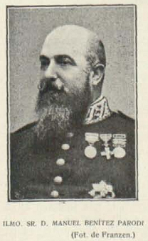 Retrato de Manuel Benítez Parodi, obra del fotógrafo Christian Franzen, recogido en la revista española La Ilustración financiera.